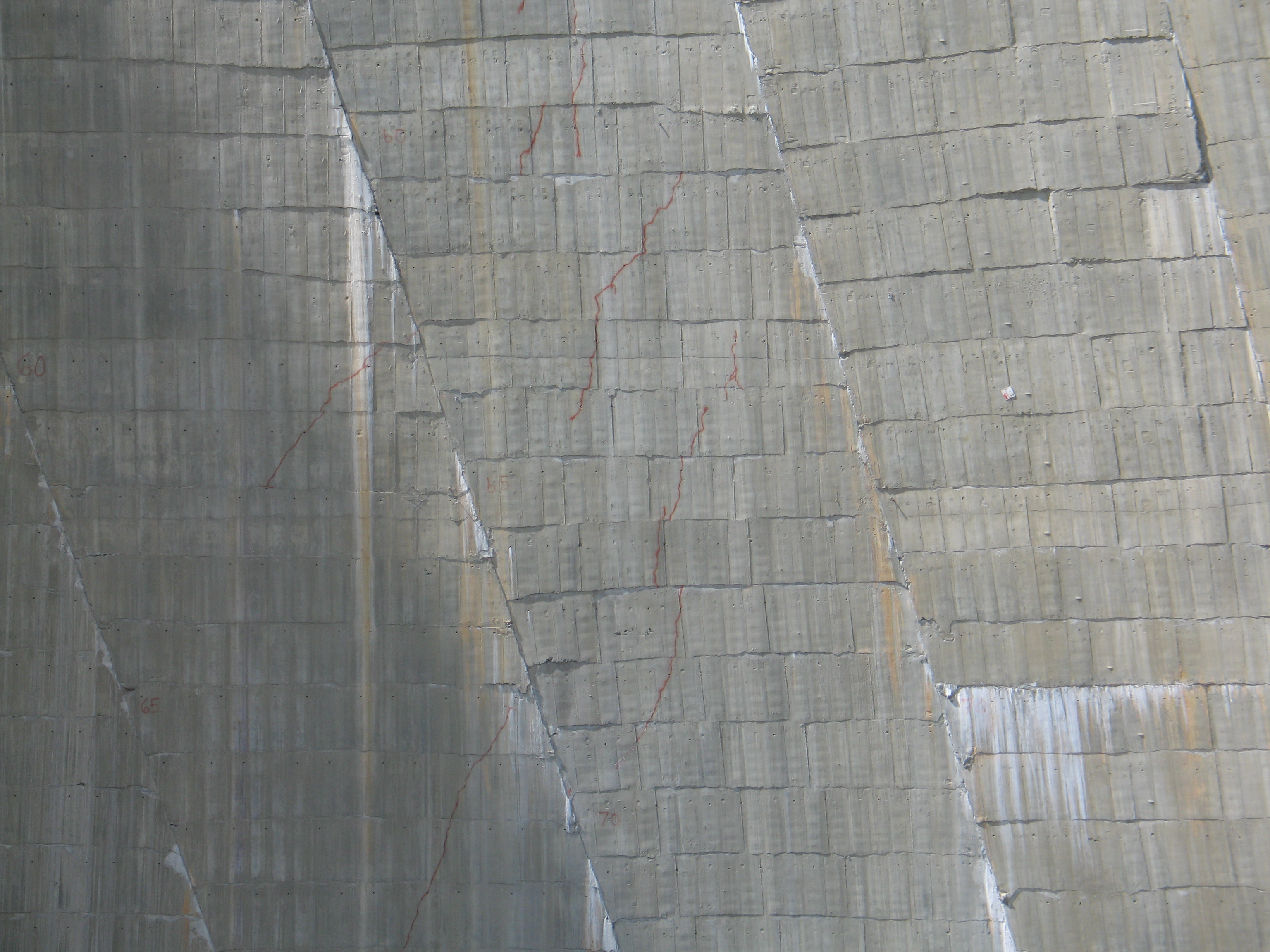 Détail d'une arche du barrage Daniel-Johnson. Des traits en rouge indiquent la présence de microfissures.